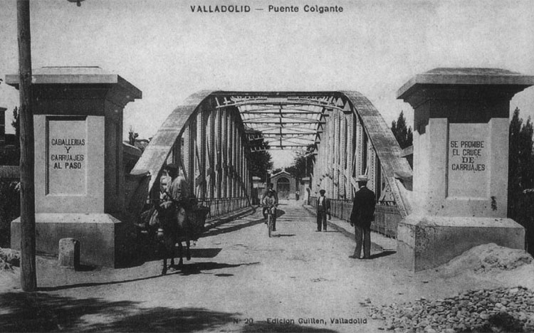 Puente Colgante - Valladolid - Colección Valladolid, postales para el Recuerdo, editada por el Diario El Mundo de Valladolid. Edición Guillén, Valladolid. Valladolid. Puente Colgante. - Fotografía. Papel 140 x 90 B/N